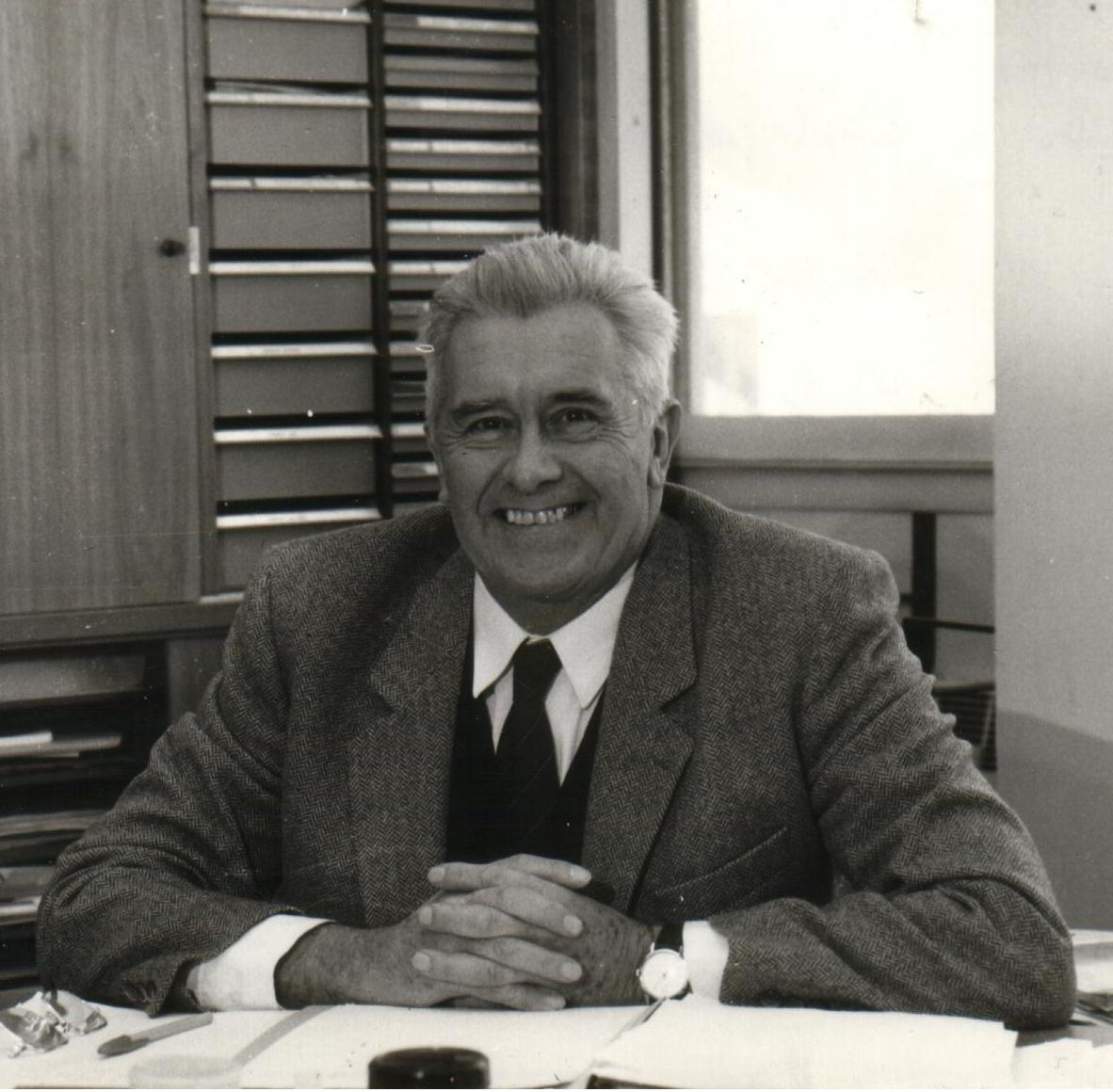 Maxime Lamotte dans son laboratoire au mois de juillet 1986. Photo prise par Françoise Lamotte, sa femme. Description Maxime Lamotte dans son laboratoireDate Juillet 1986Source Françoise LamotteAuthor Françoise Lamotte Maxime Lamotte dans son laboratoire